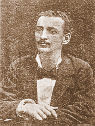 Levon Balyan'ın portresi